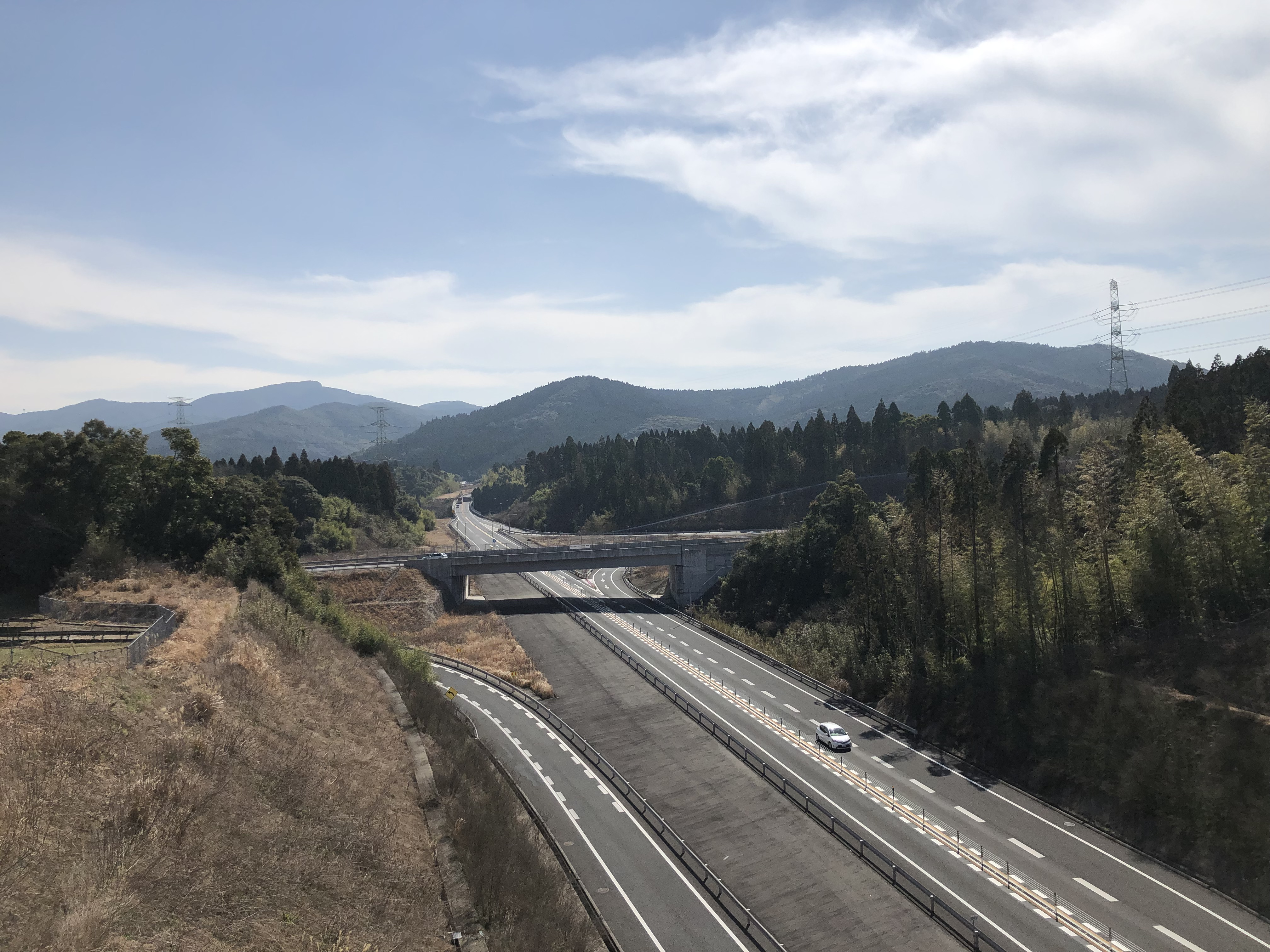 南九州西回り自動車道薩摩川内都ICのランプを熊本方面から鹿児島方面に望む